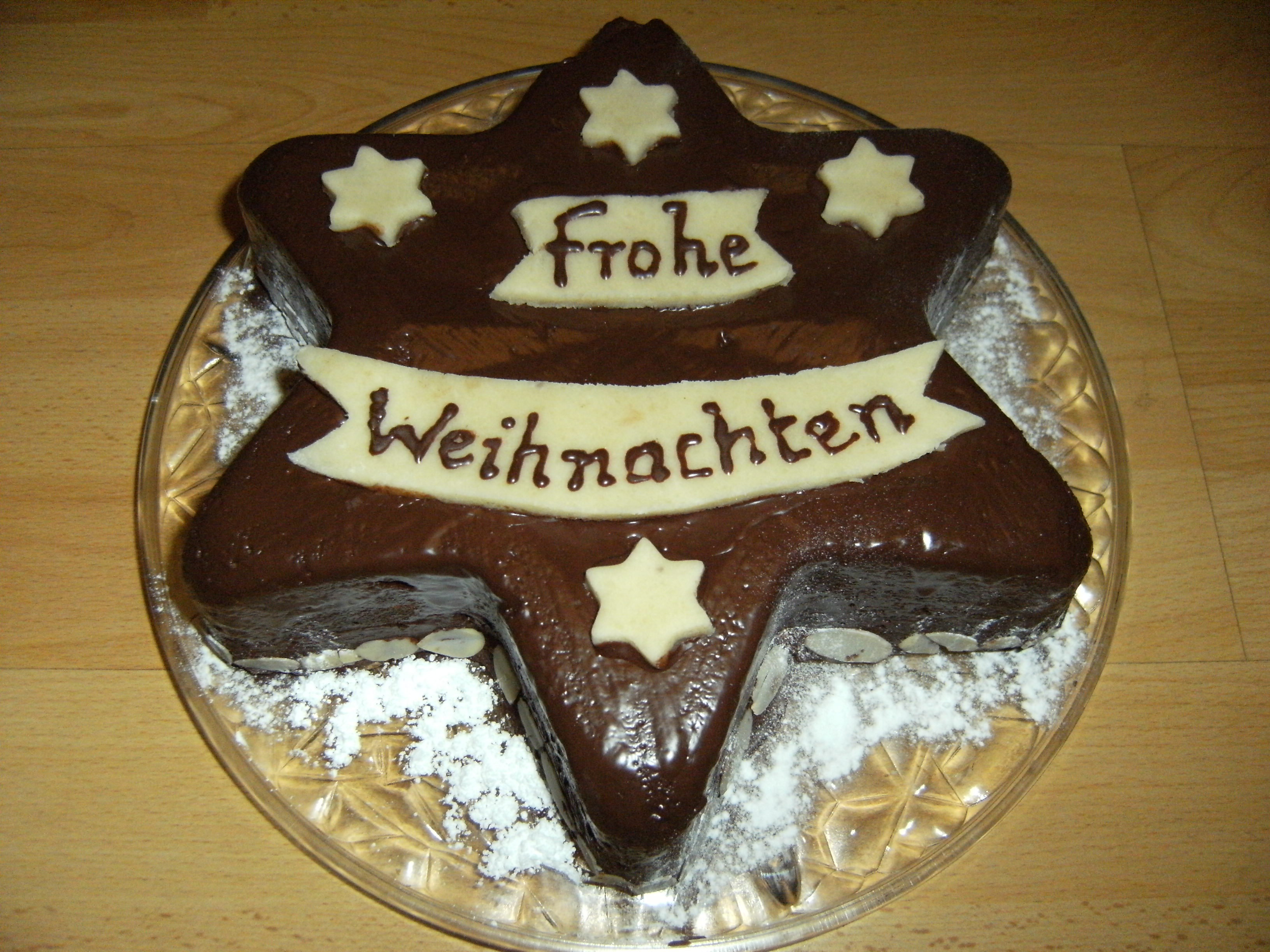 Weihnachtsschokoladenkuchen 2010 mit Marzipan-Schrift.